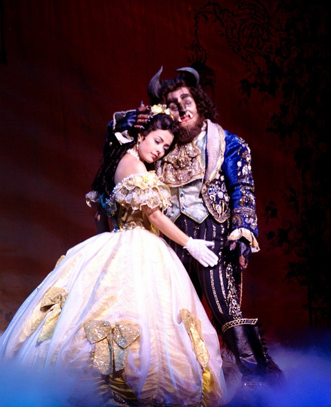 Li Martins na peça The Beauty and the Beast, em 2009.